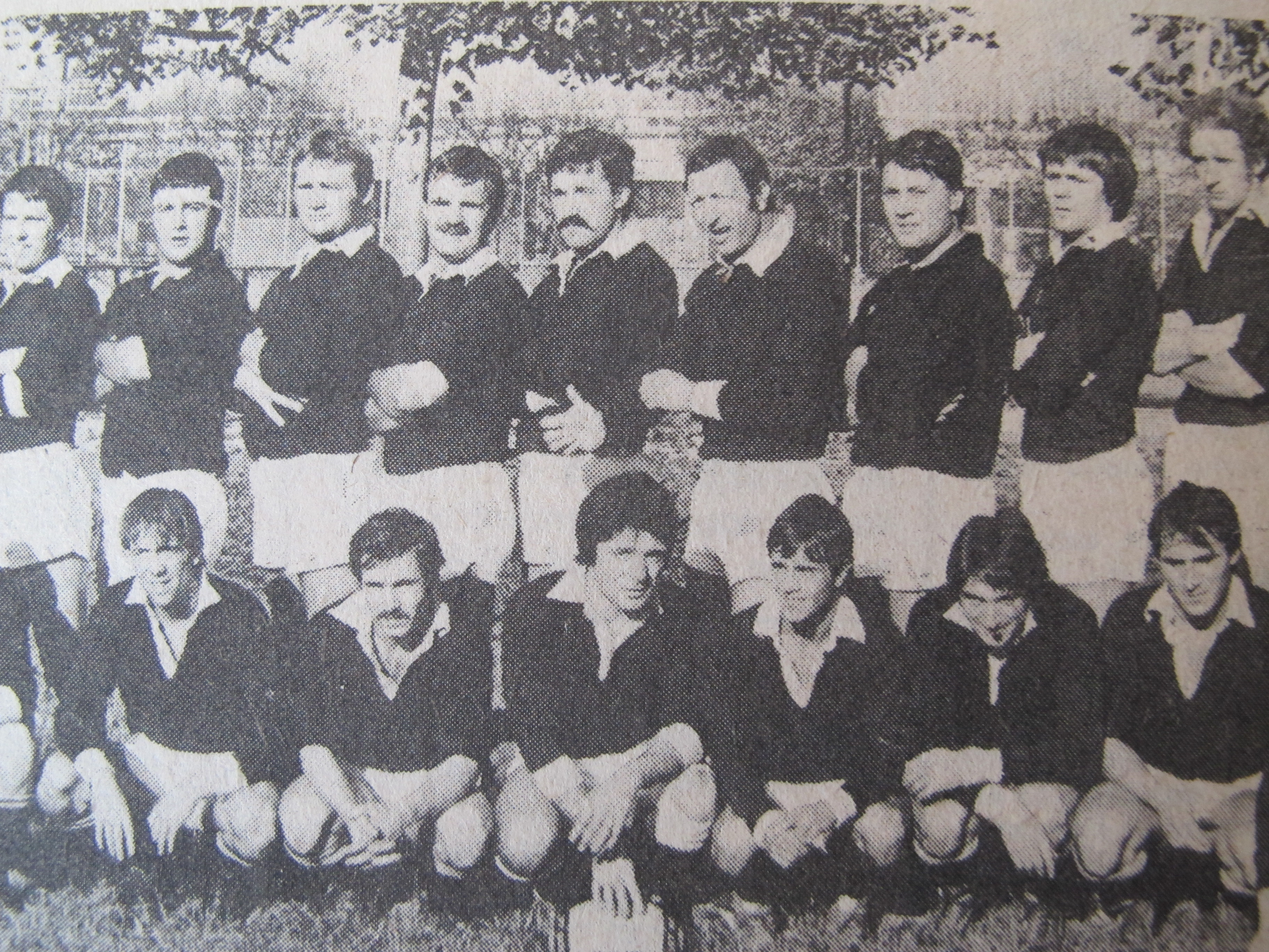 USFL Année 1981